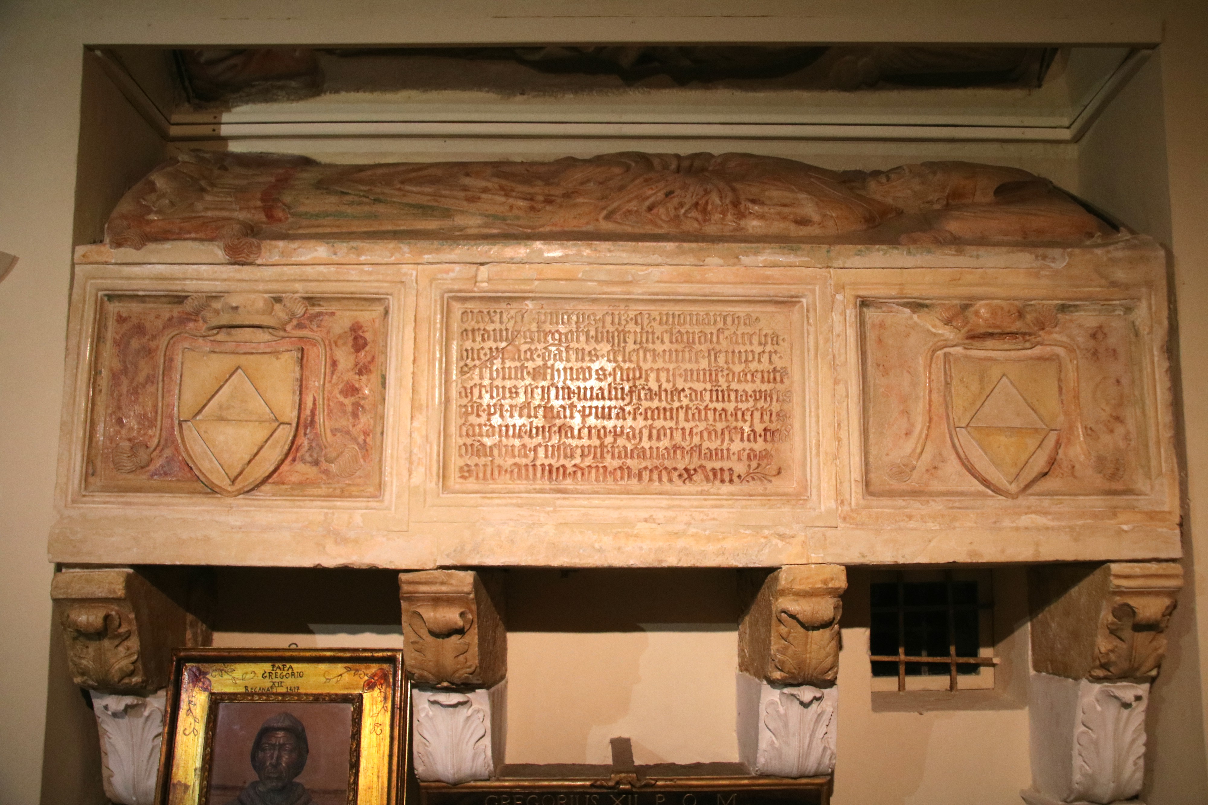 Concattedrale di San Flaviano (Recanati)